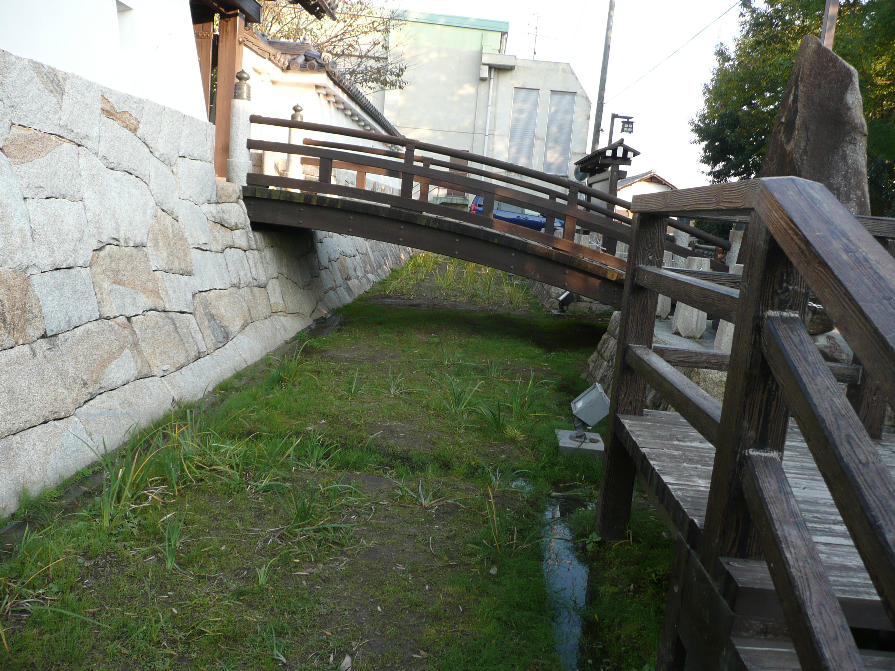 小口城の空堀